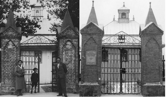 Comparison of Trakai Kenesa in 1932 and 2002